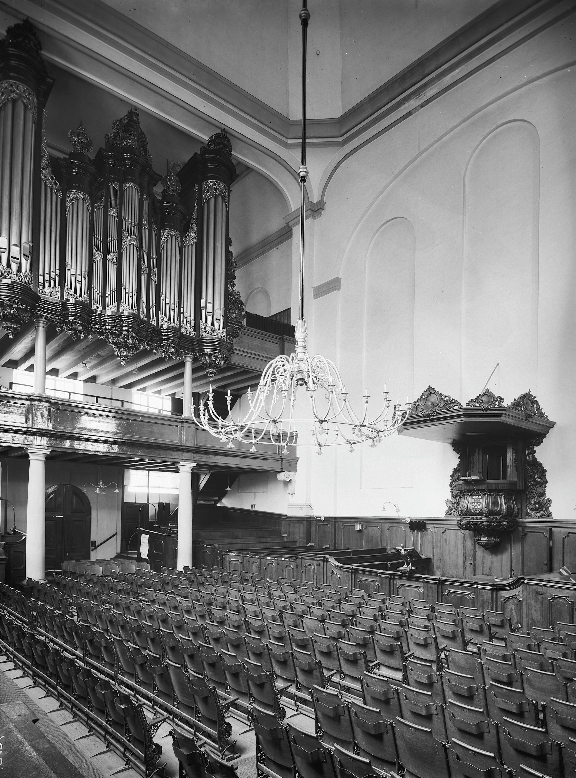 Lutherse Kerk: interieur naar het zuid-westen